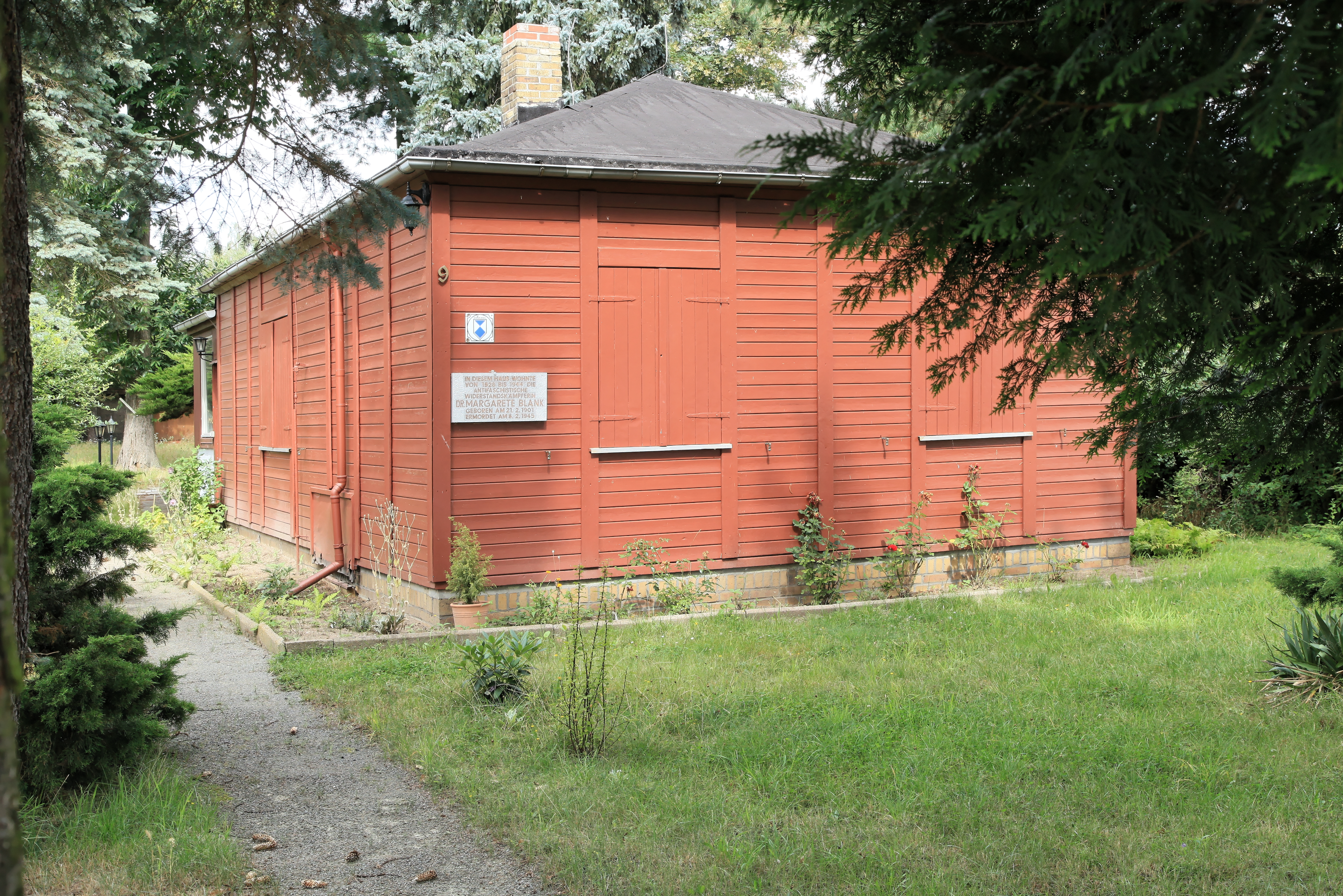 Margarete-Blank-Gedenkstätte, Margarete-Blank-Straße in Panitzsch, Borsdorf